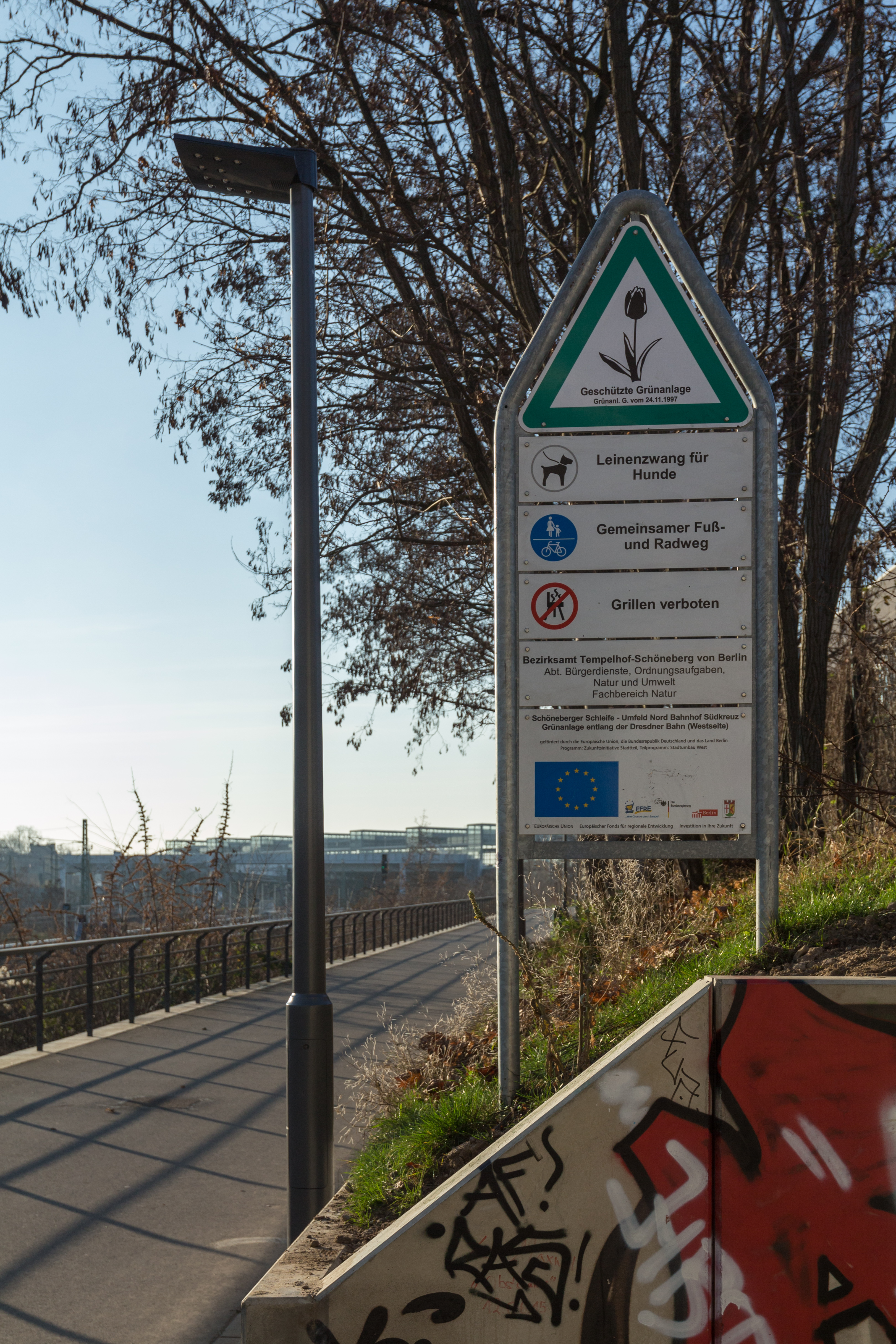 Schöneberger Schleife an der Dresdner Bahn in Berlin-Schöneberg. Diese Schild befindet sich südlich des Alfred-Lion-Stegs.